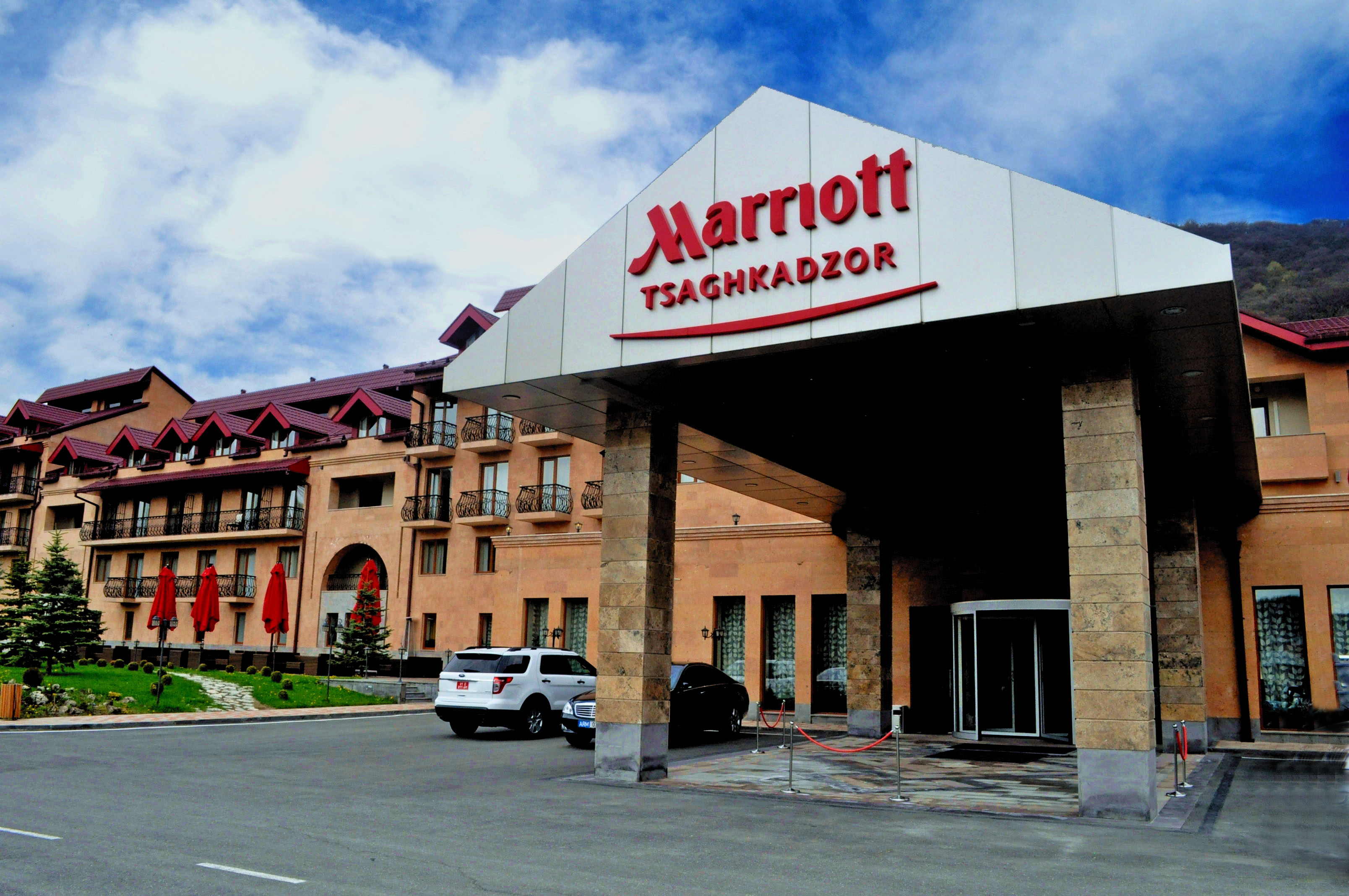 Гостиничный комплекс «Марриотт Цахкадзор»